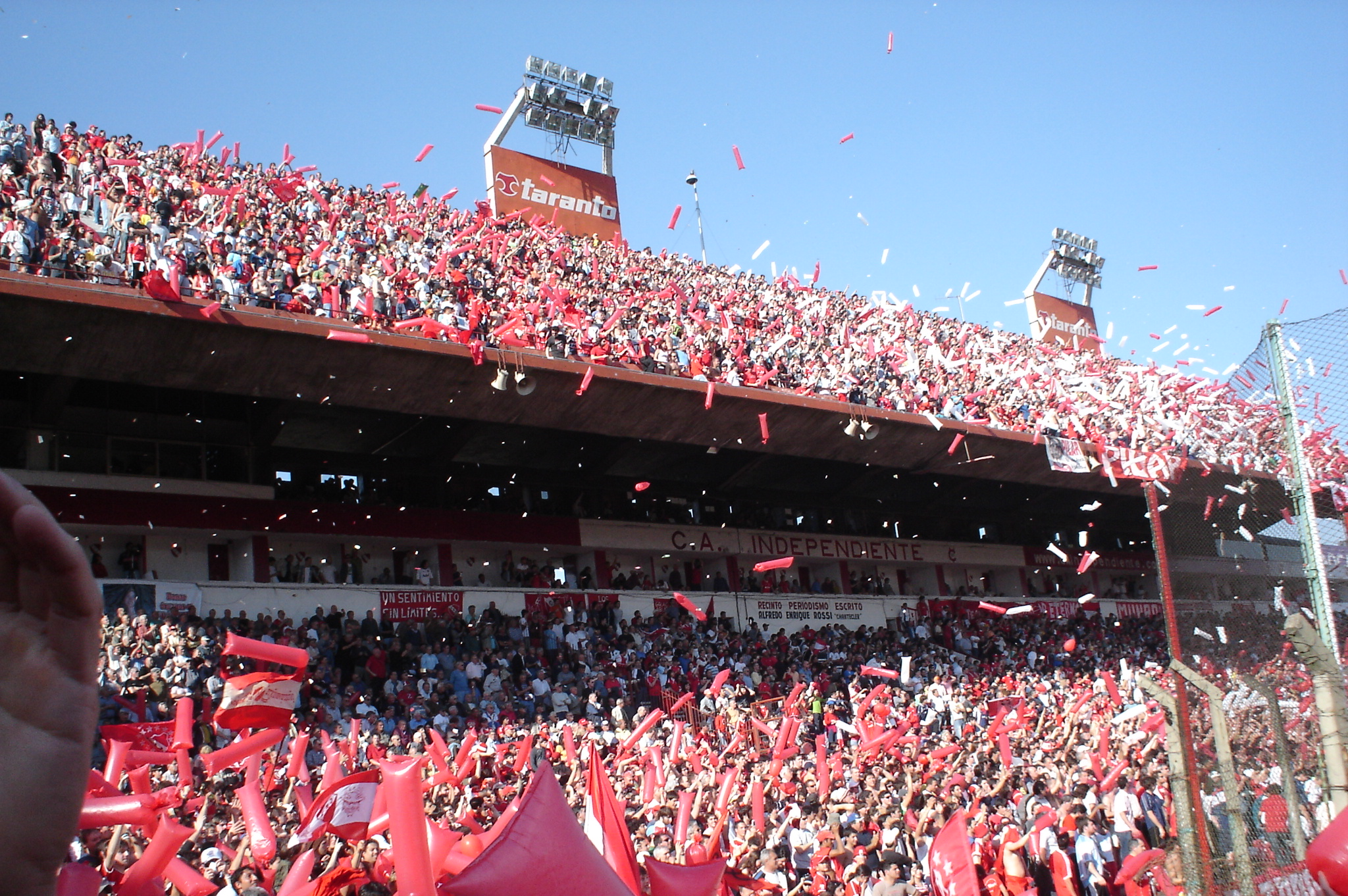 Estádio Libertadores da América, Club Atletico Independiente, Avellaneda, Argentina